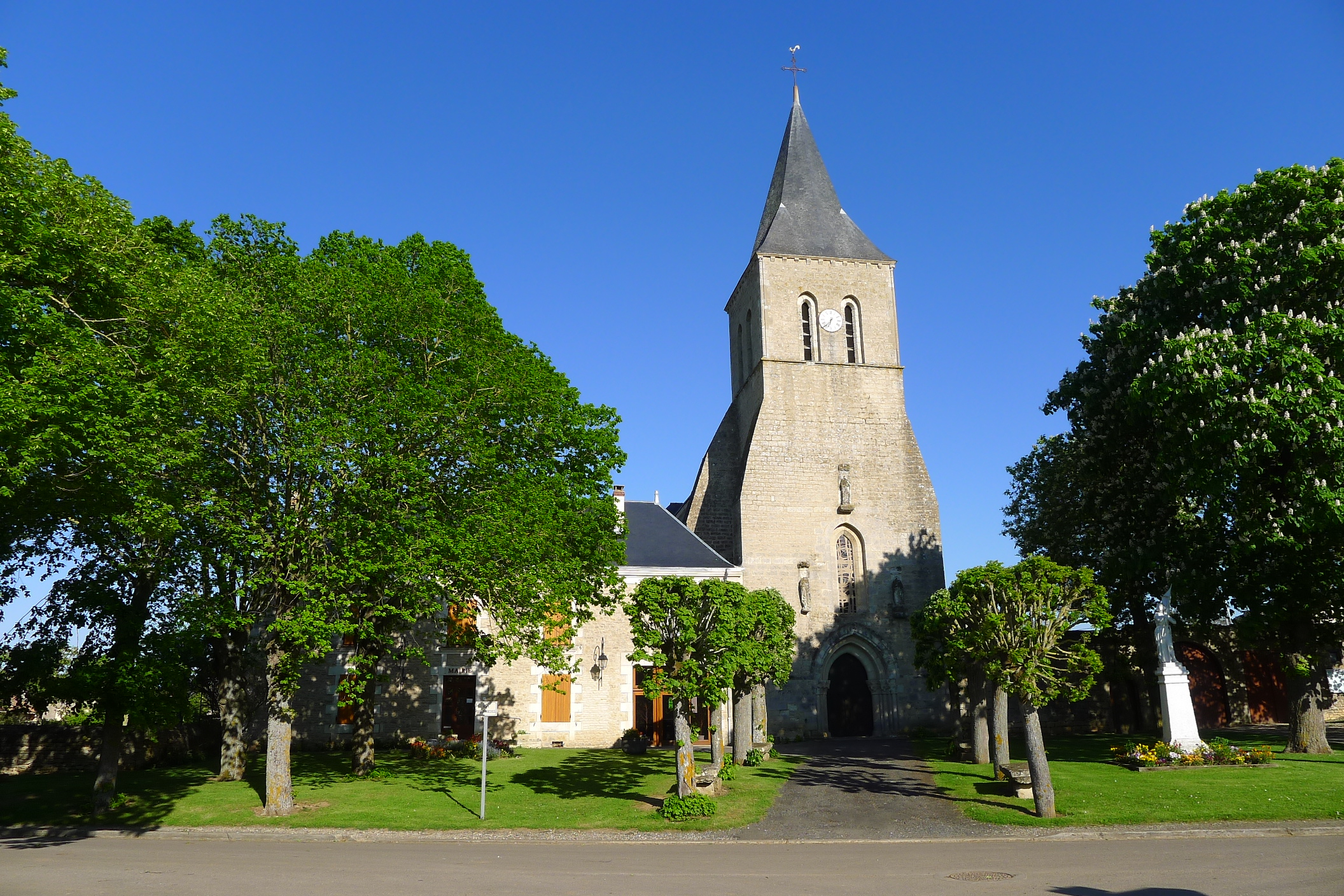 Place communale de Craon et l'église Saint-Michel